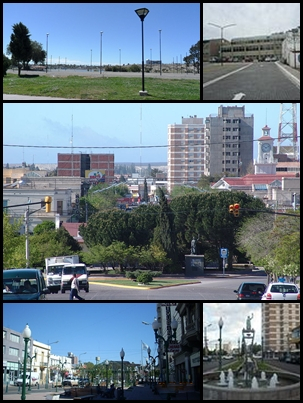 Foto montaje de Trelew, Patagonia Argentina